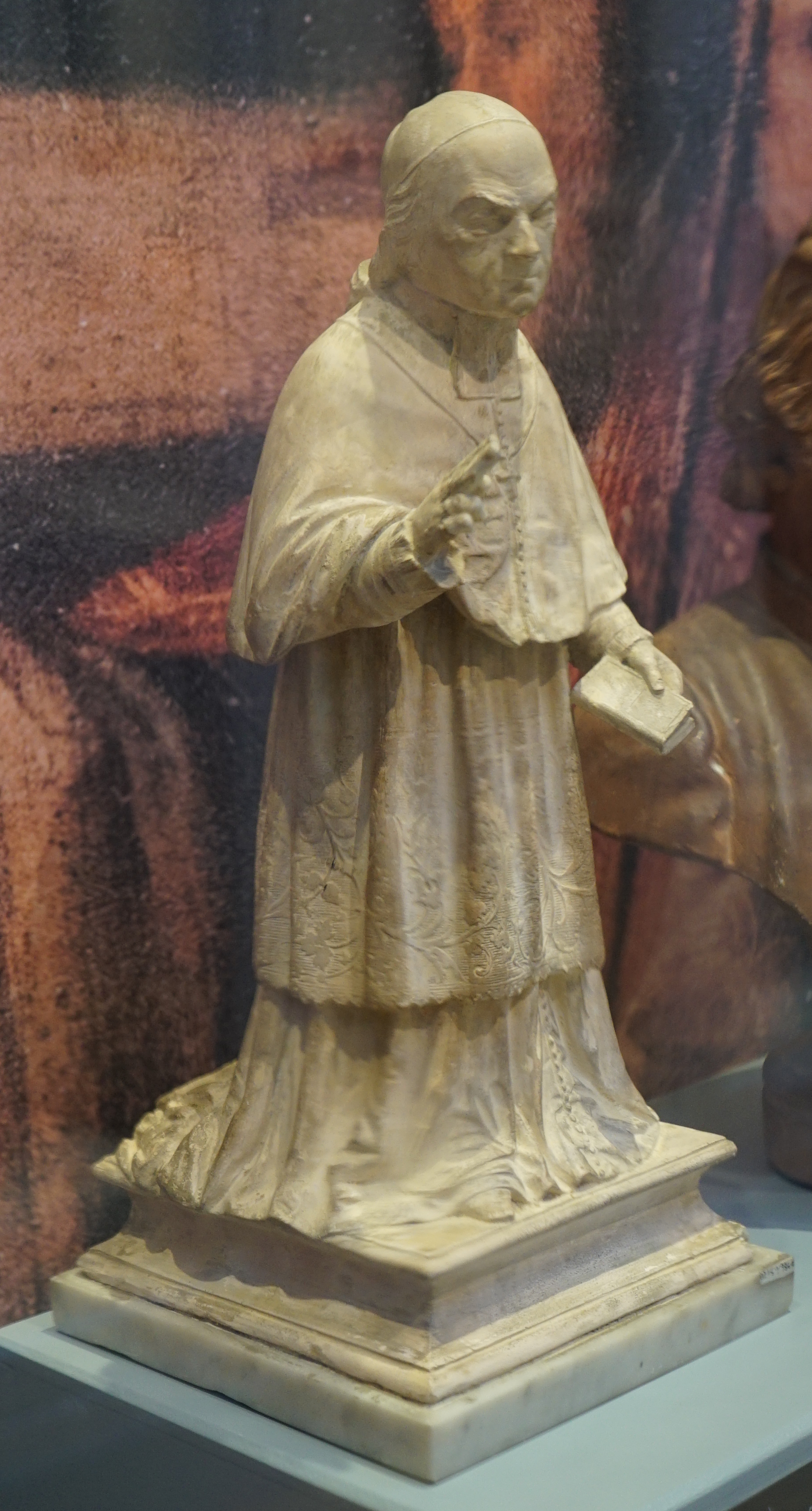 lors d'une exposition temporaire. Sculpture de jean riondet.